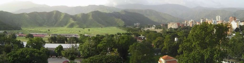 Las montañas o cabeceras del valle de Tocopio. En los ultimos 20 años incremento el urbanismo en este valle, con la urbanización Montaña Fresca, en espacios que eran de uso militar. Maracay.